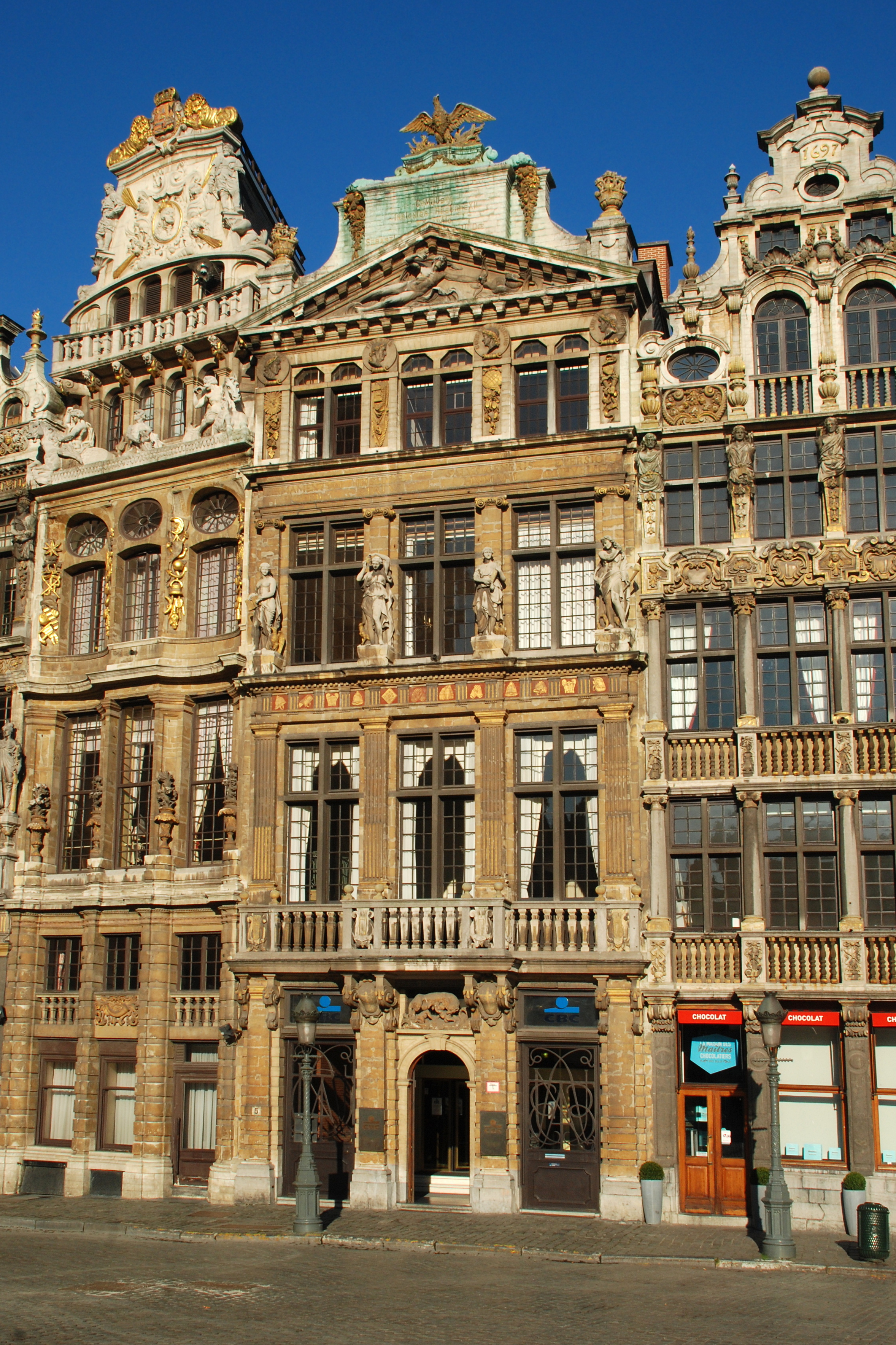 Belgique - Bruxelles - Grand-Place - Maison de la Louve